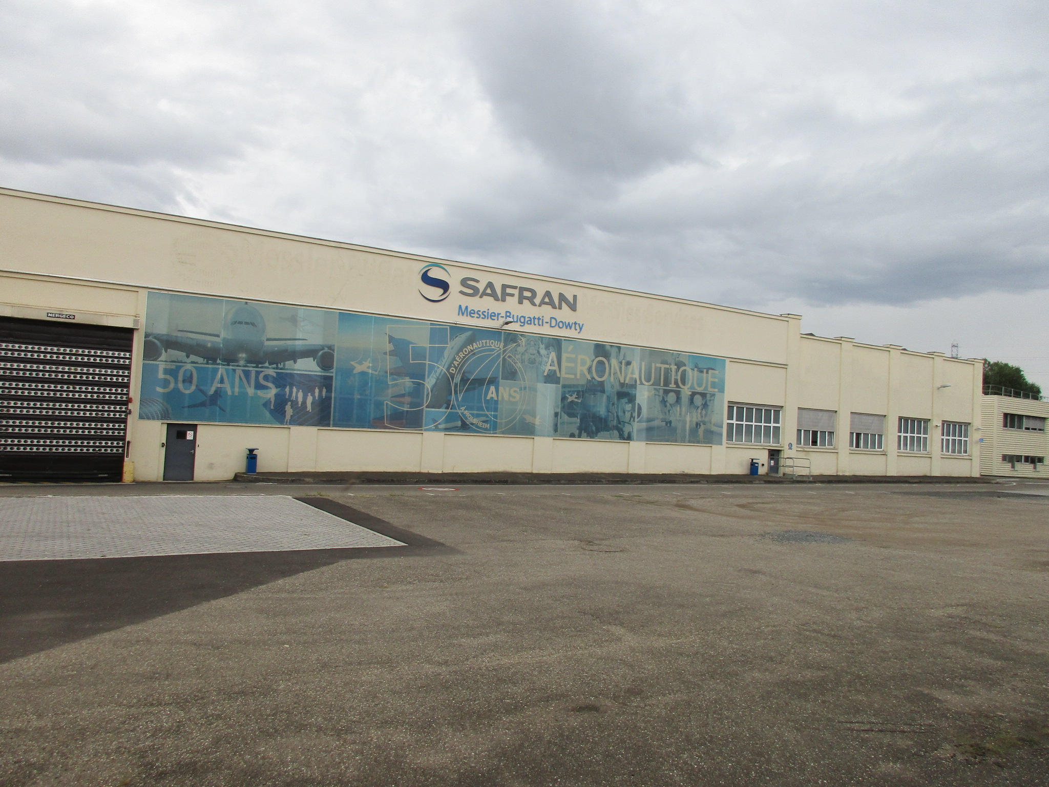 Usine Bugatti de Molsheim